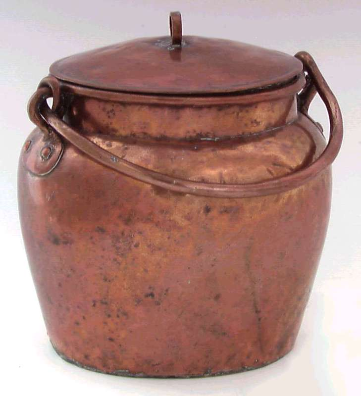 Melkespann i kobber fra Alstadhaug i Nordland. Spannet er trolig laget rundt midten av 1800-tallet. Foto Norsk Folkemuseum, NF.1921-2202.